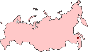 Komsomolsk-na-Amur in Russia